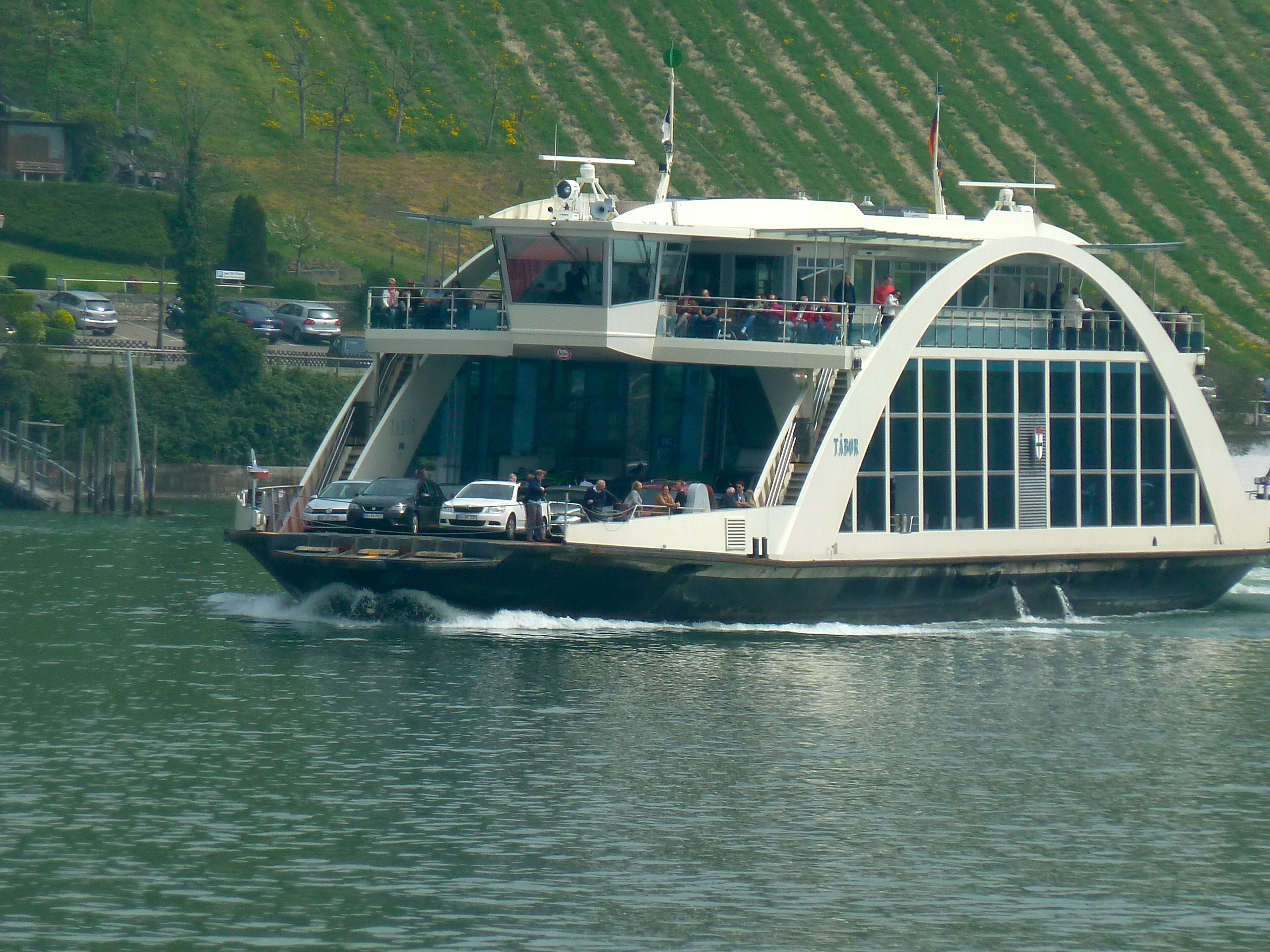 Die erste Autofähre mit dem "Brücken-Design" fährt vor den Meersburger Weinbergen Richtung Staad.